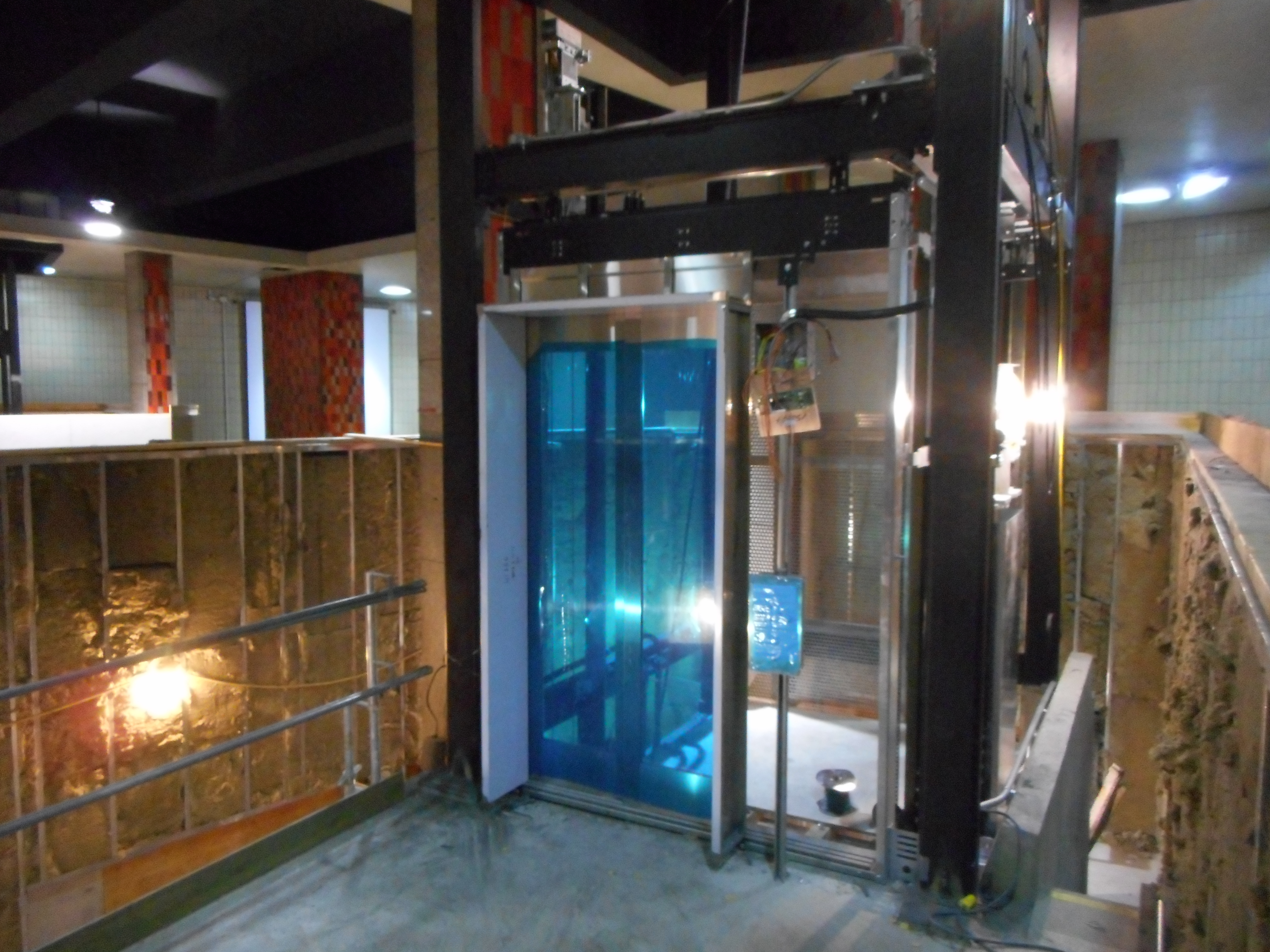 Station de métro Rosemont, Montréal Ascenseur